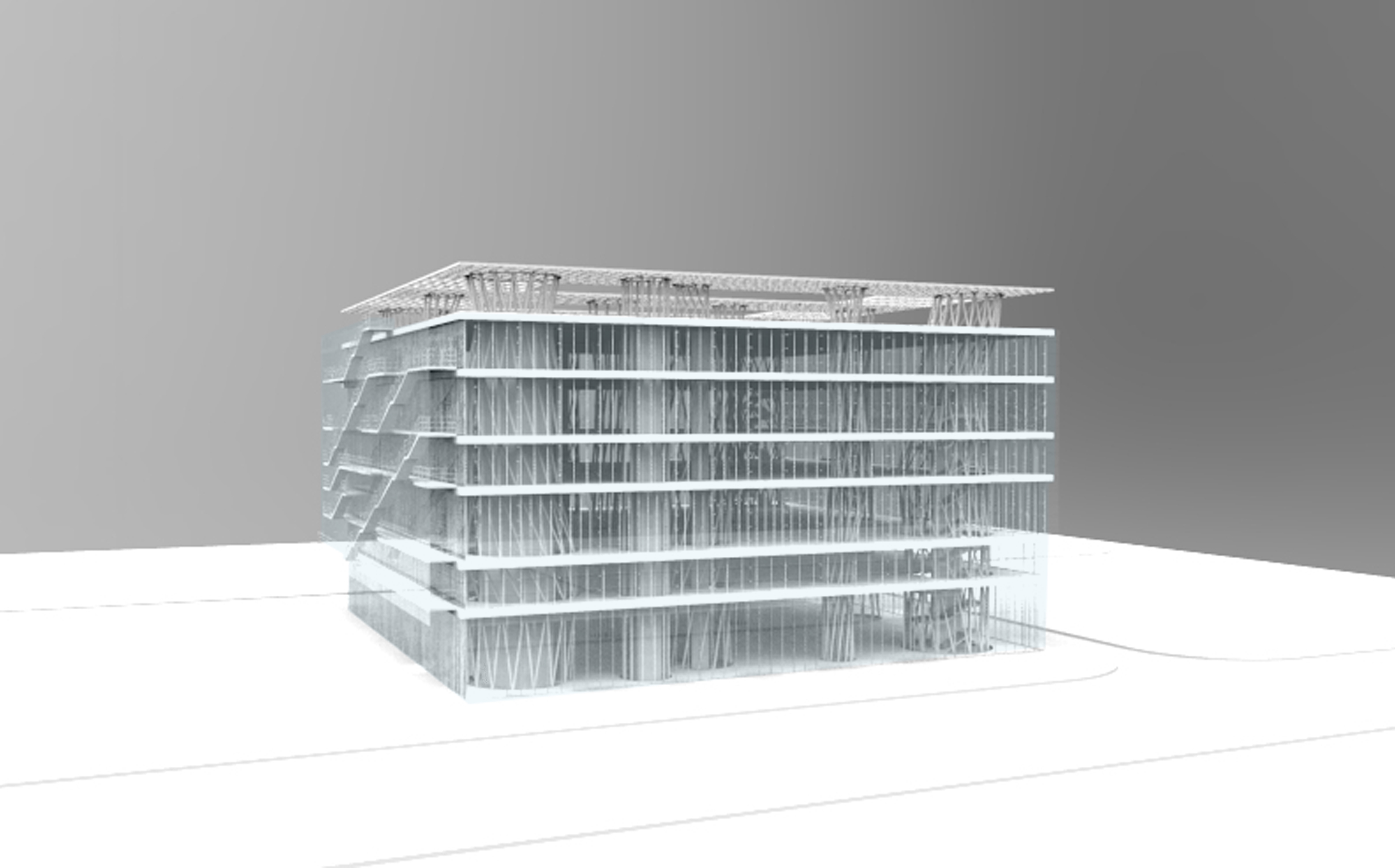 800x492 px 72dpi 110kb RGB